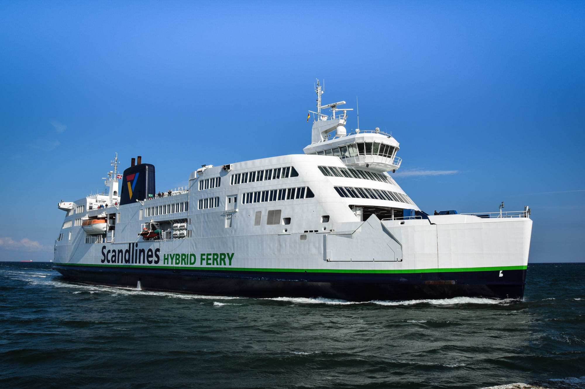 Fähre Prinsesse Benedikte vor Puttgarden